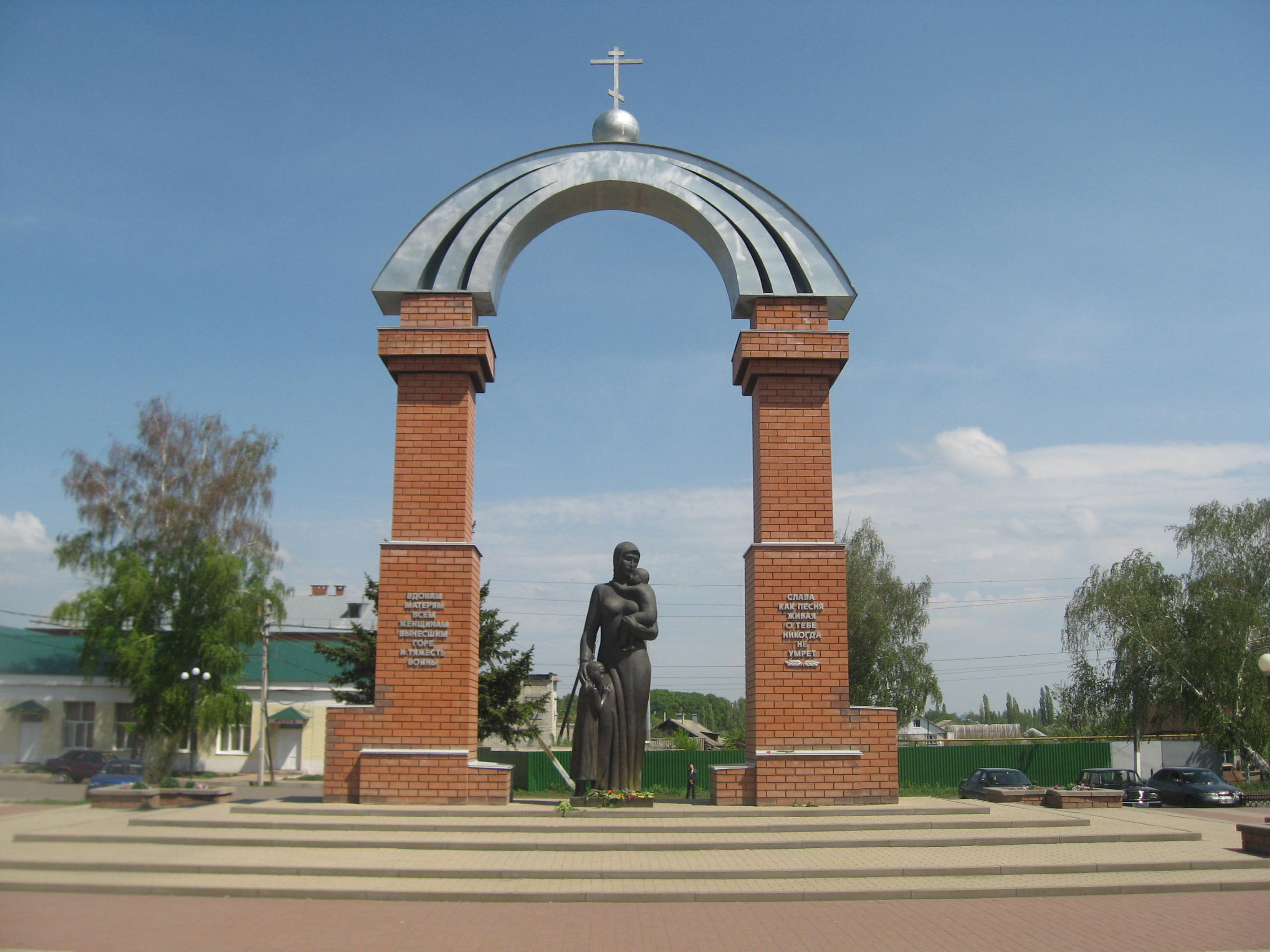 Виден памятник.